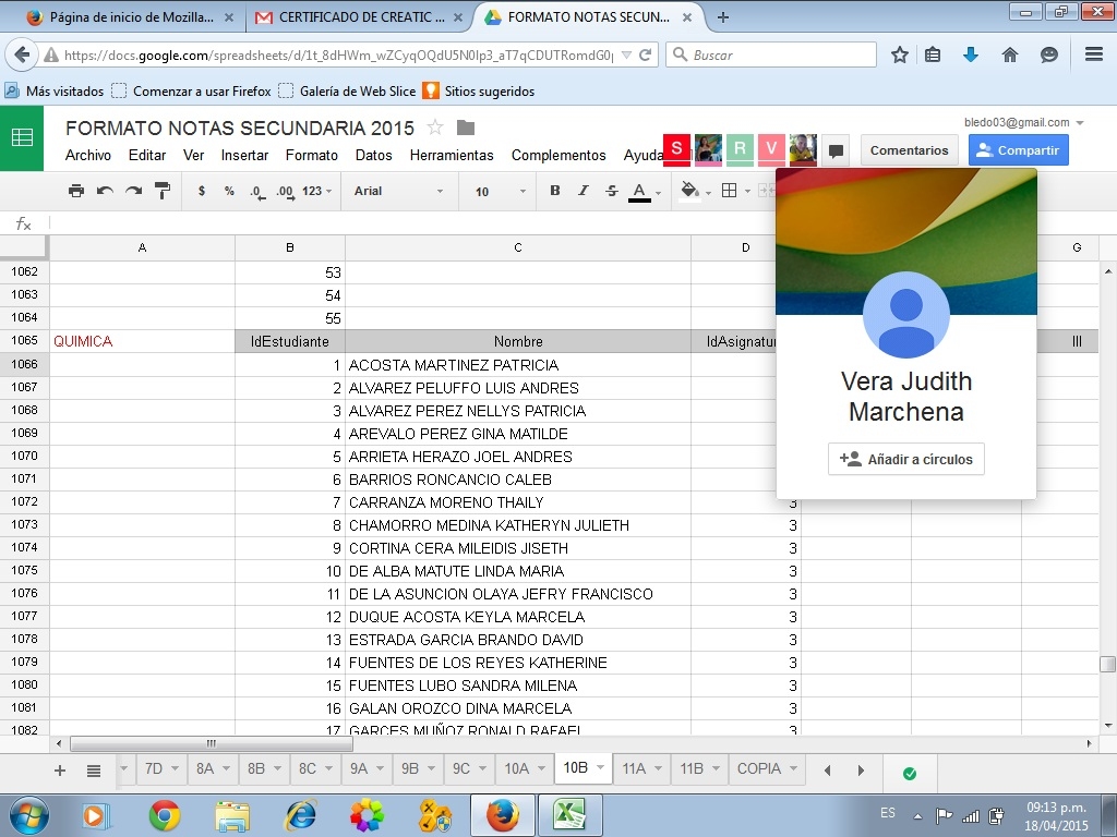 Google Drive, herramienta de trabajo colaborativo en linea de fácil acceso.